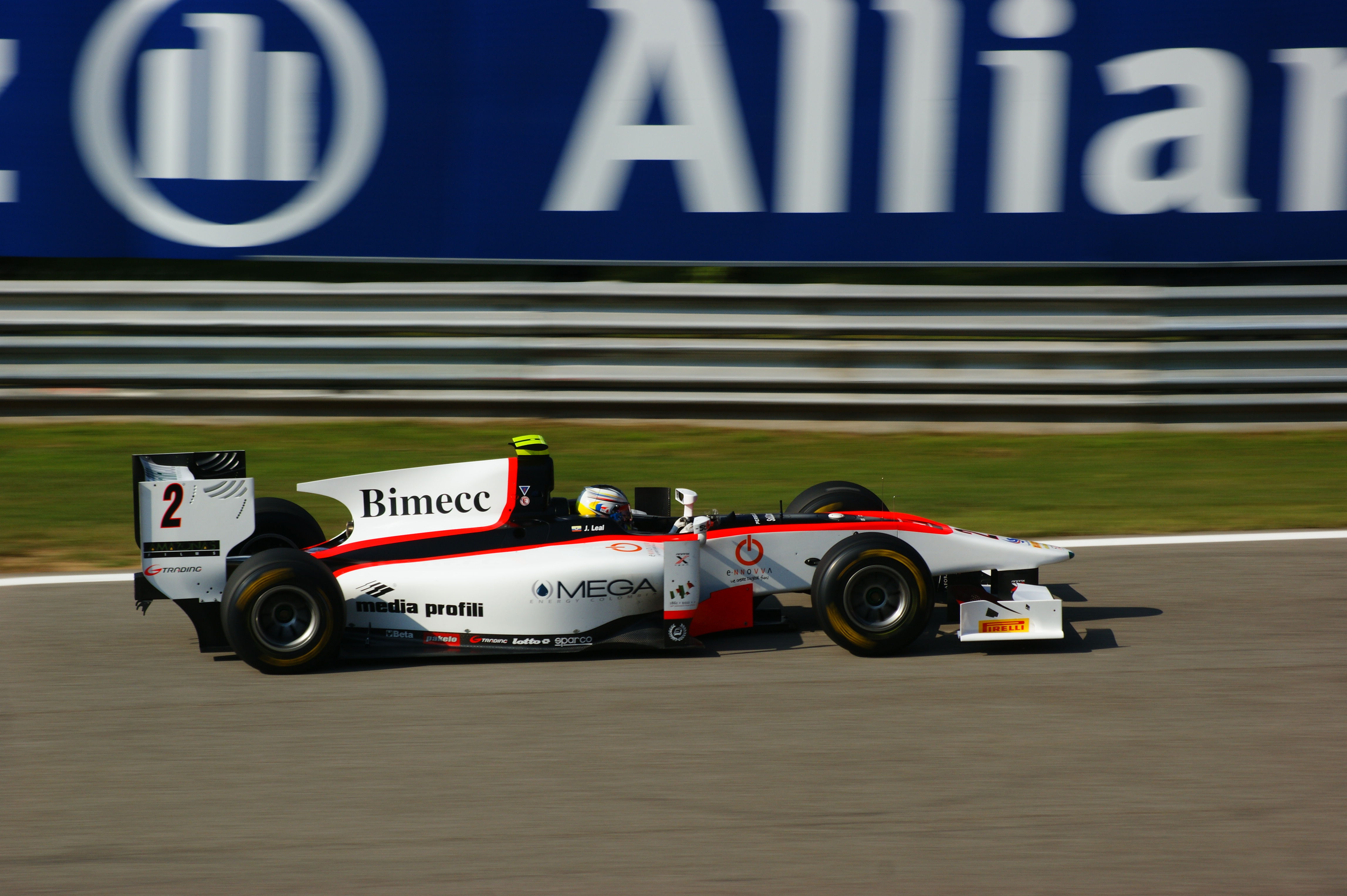 Julián Leal alla variante della roggia Monza 2011